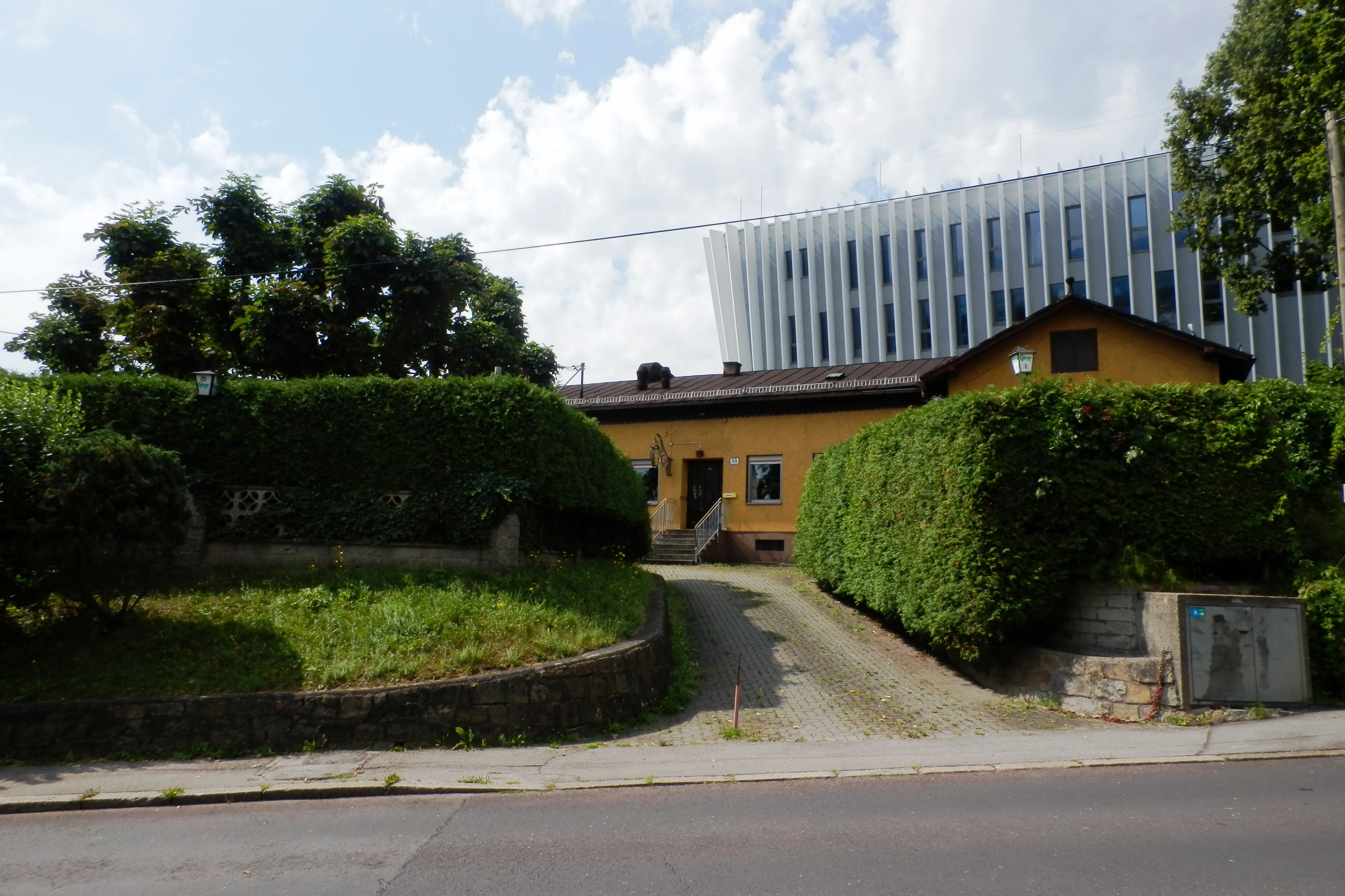 Ehem. Bierhalle der Brauerei des Schlosses Hagen, Gasthaus Hagendiele, Linz, Hagenstraße